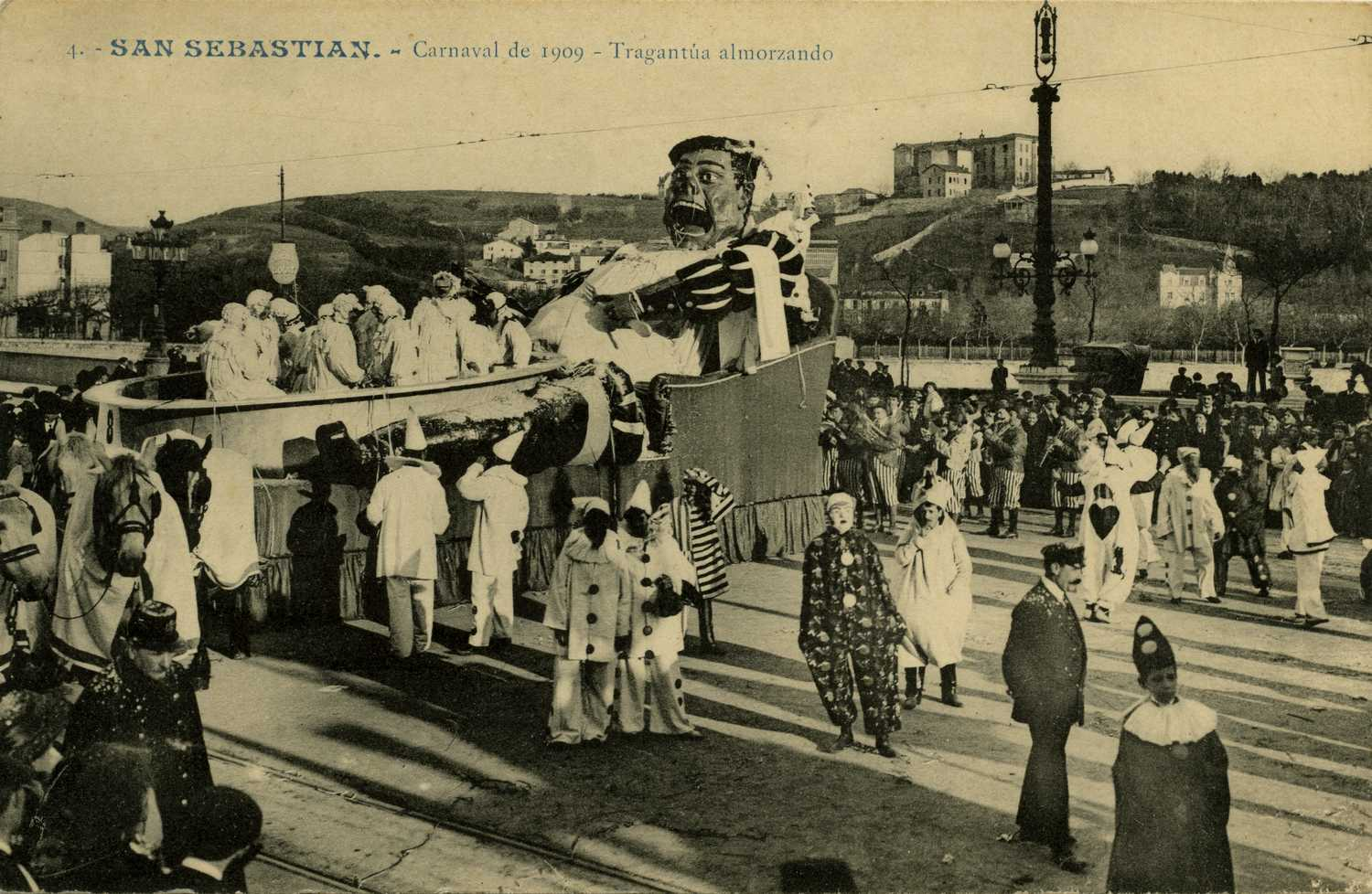 San Sebastián : carnaval de 1909 : tragantúa almorzando